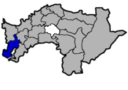 KaurJmeb為編輯中華民國臺灣省嘉義縣布袋鎮，於2005年2月10日所繪。